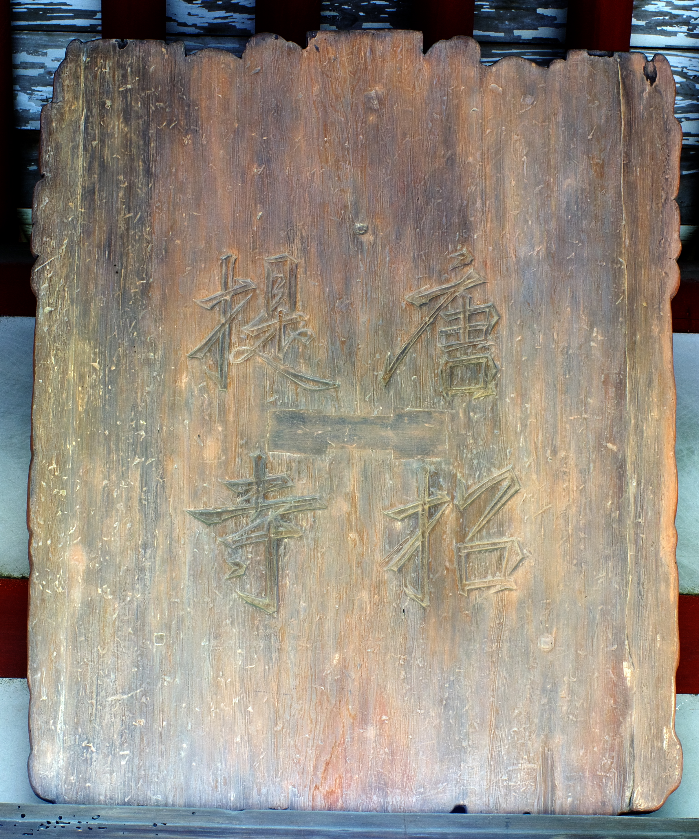 唐招提寺南大門の勅額レプリカ。伝孝謙天皇宸筆。